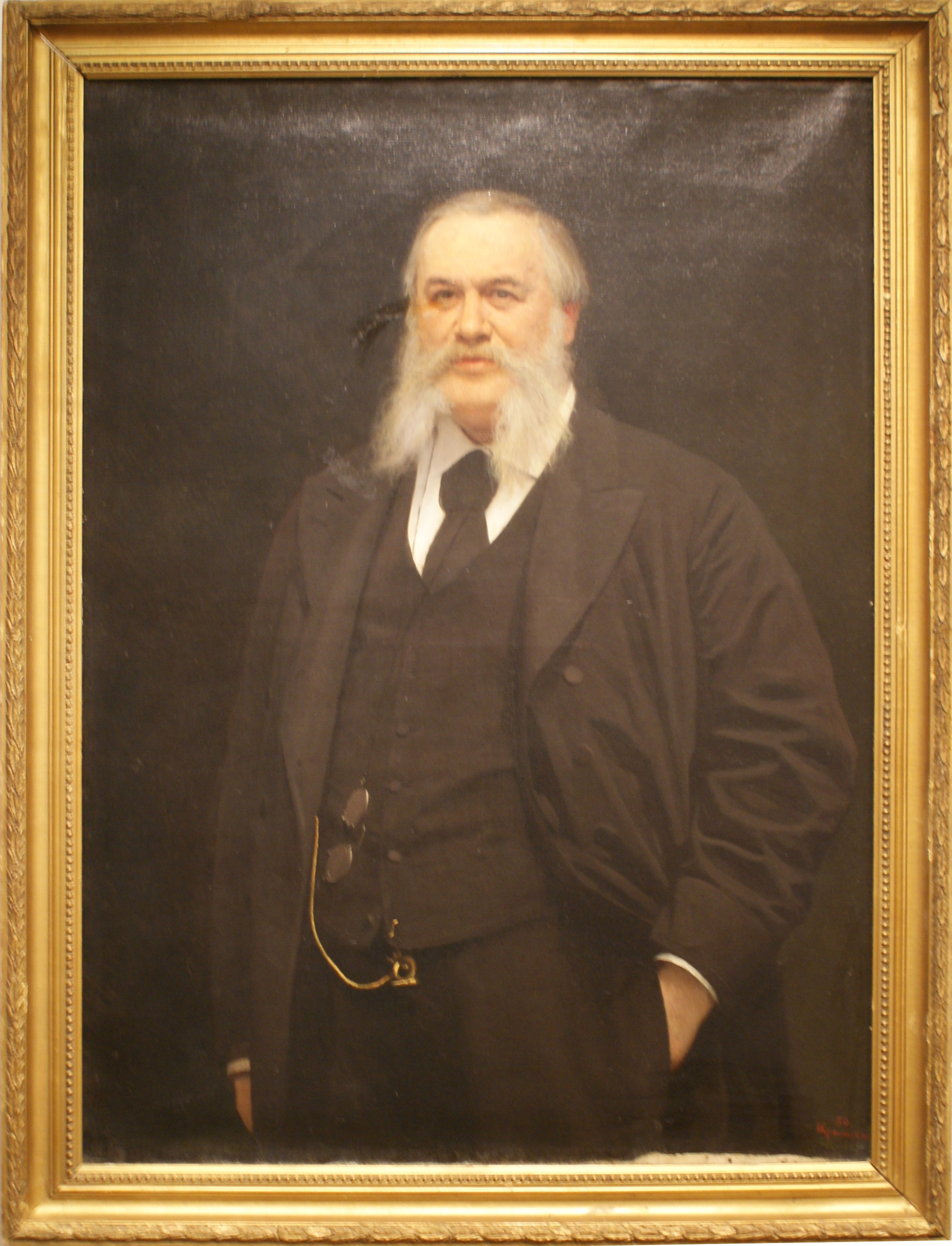 Партрэт А. А. Шчарбатава. Палатно, алей